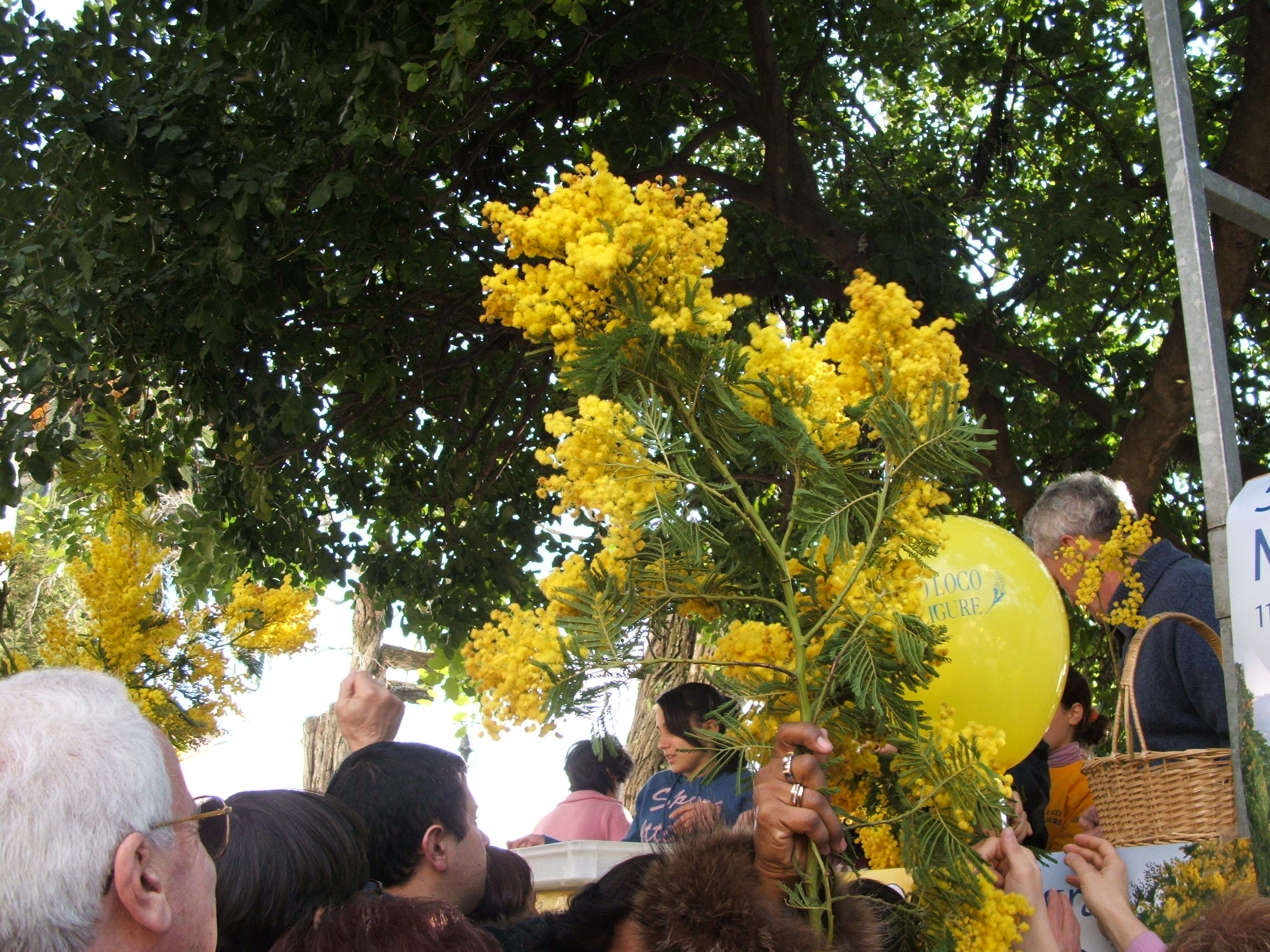 Immagine della Sagra della mimosa 2006 a Pieve Ligure in provincia di Genova